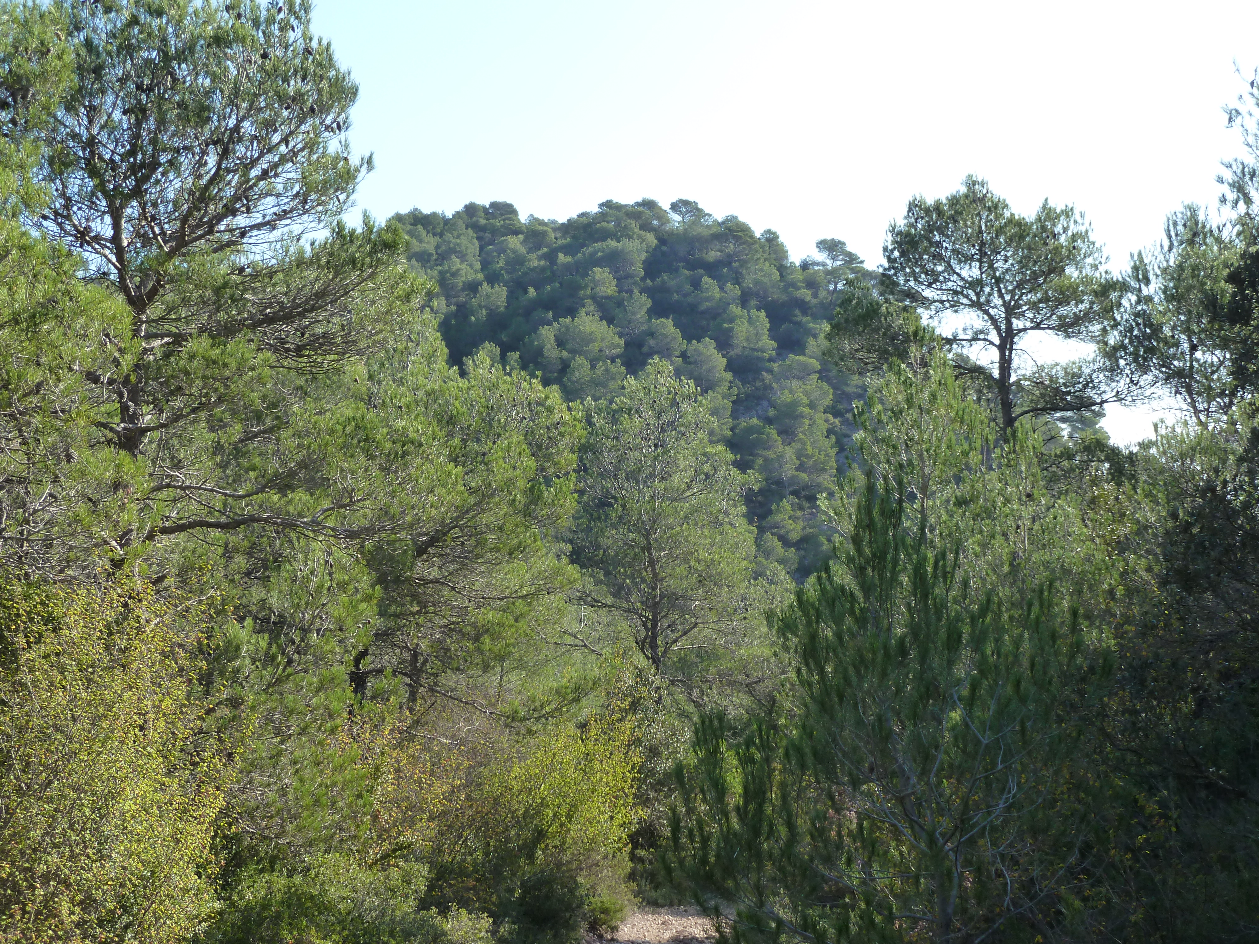 Vista de la muntanya del Turó de la Vinya